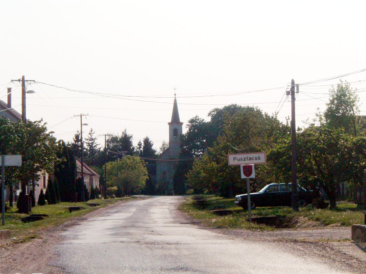 Pusztacsó, Hungary